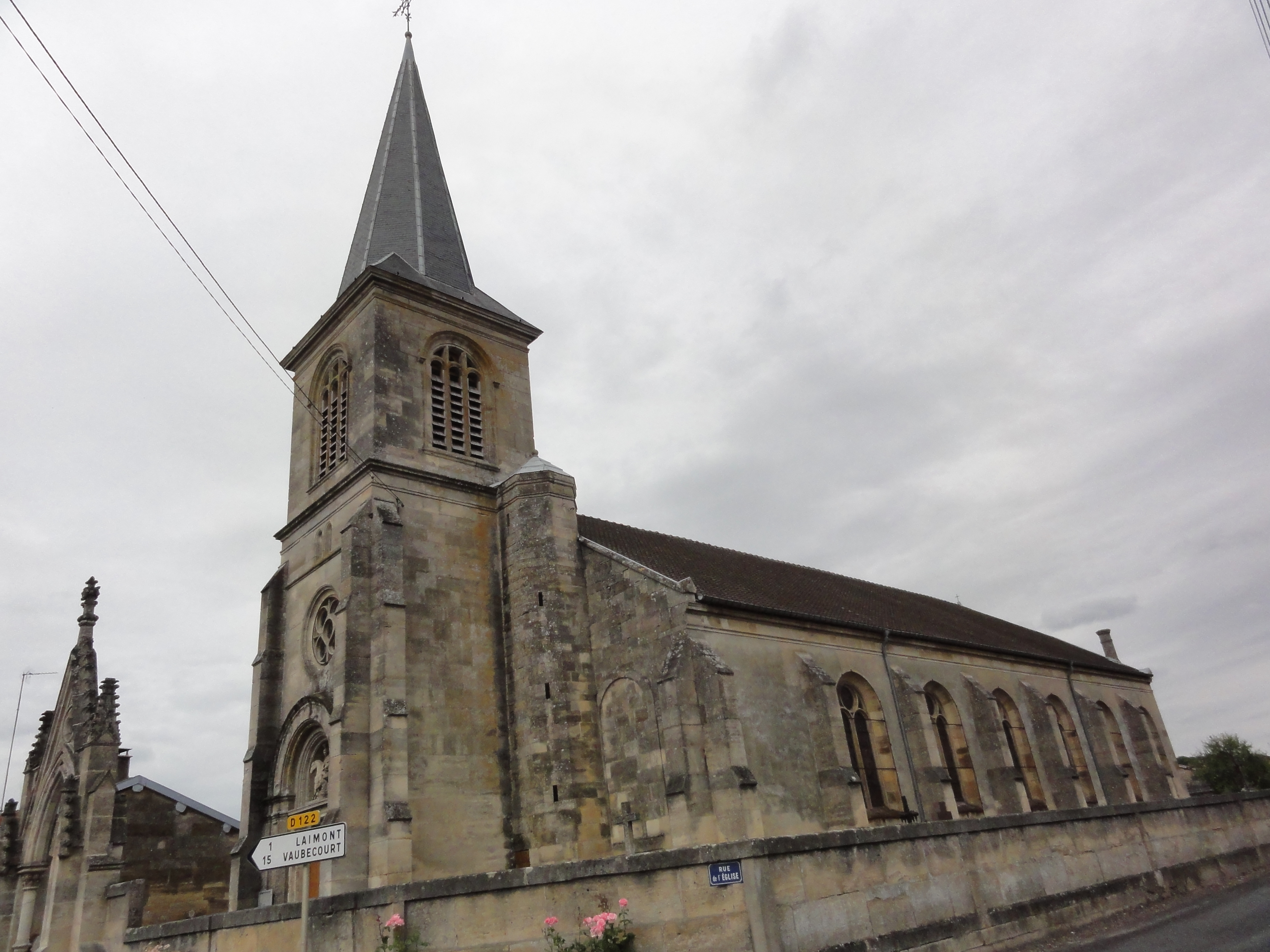 Neuville-sur-Ornain (Meuse) église